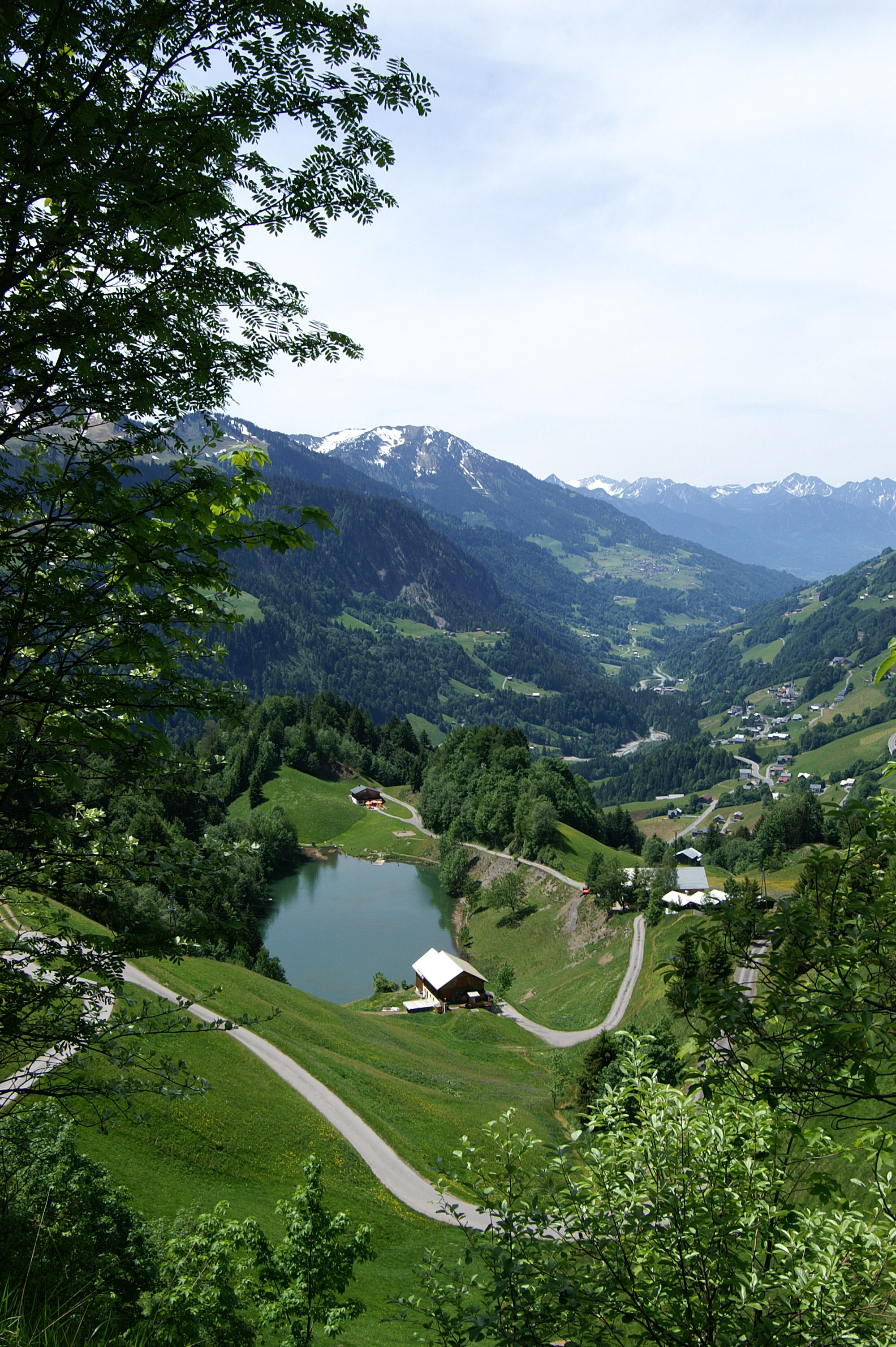 Blick von Seewald, am Fusse der Blasenka 2004m auf den Seewaldsee im Gemeindegebiet von Fontanella im Große Walsertal, Vorarlberg.